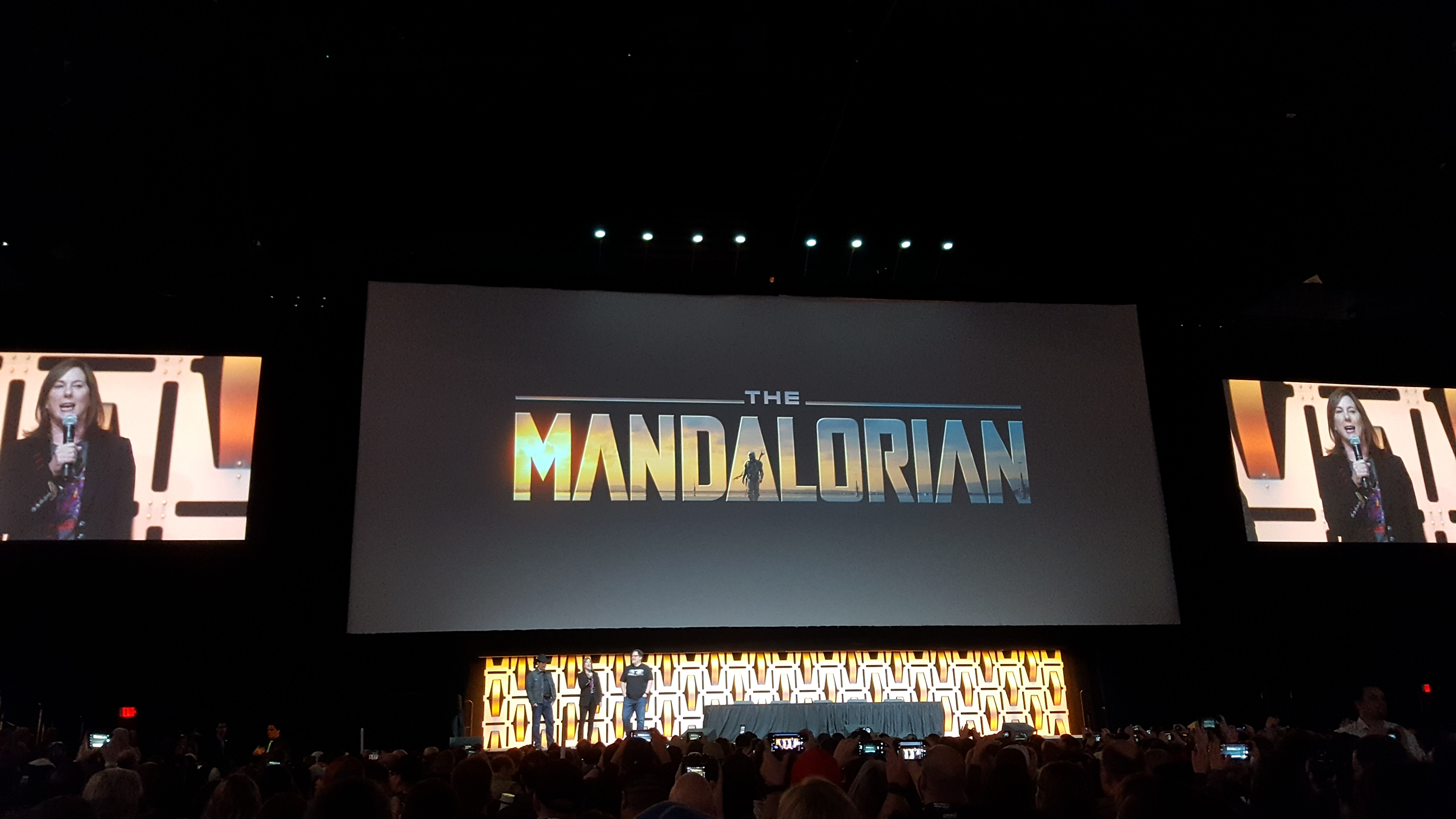 Les créateurs de la série The Mandalorian sur la Celebration Stage en compagnie de la présidente de Lucasfilm Kathleen Kennedy